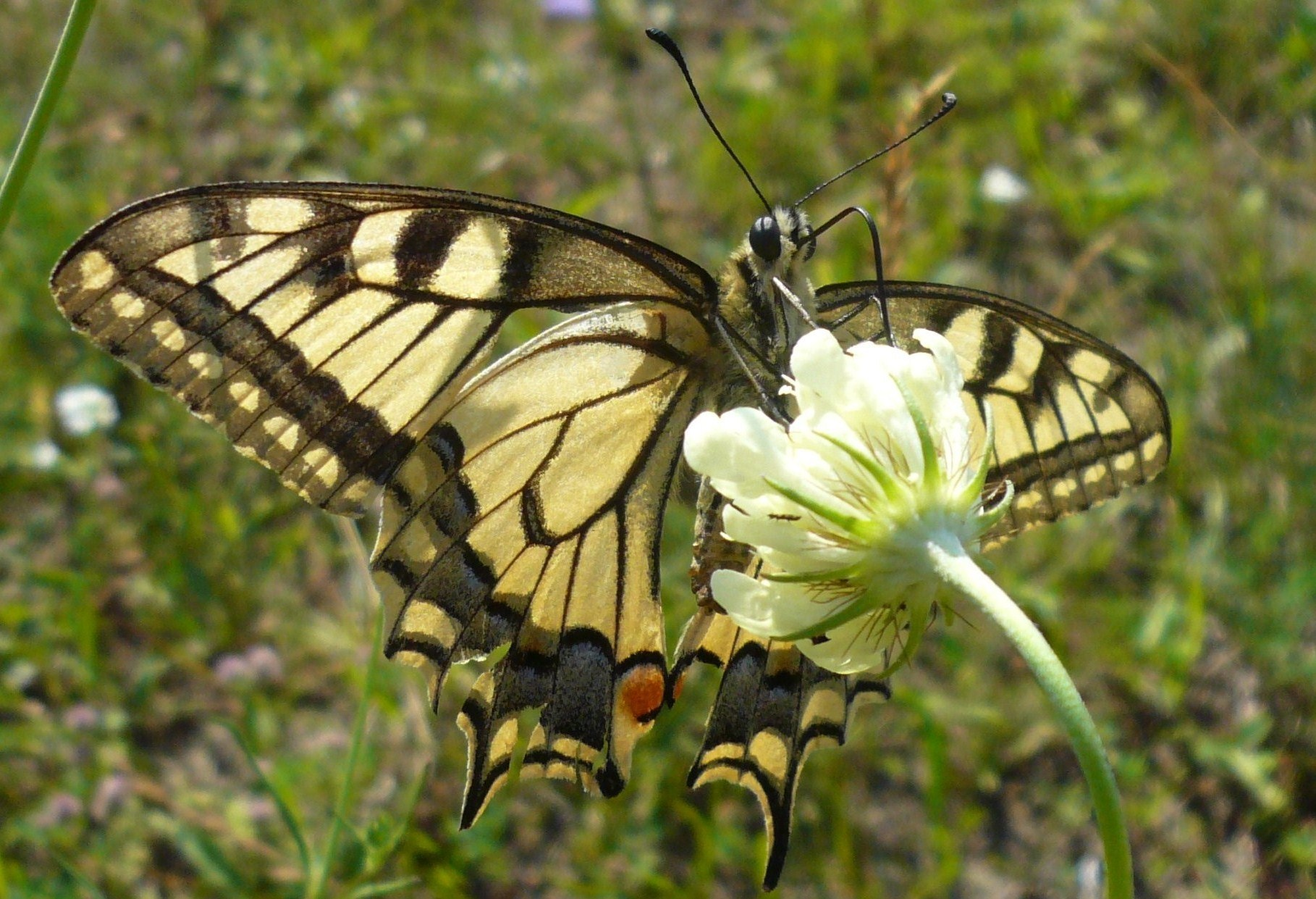 Paź królowej na poligonie WAT